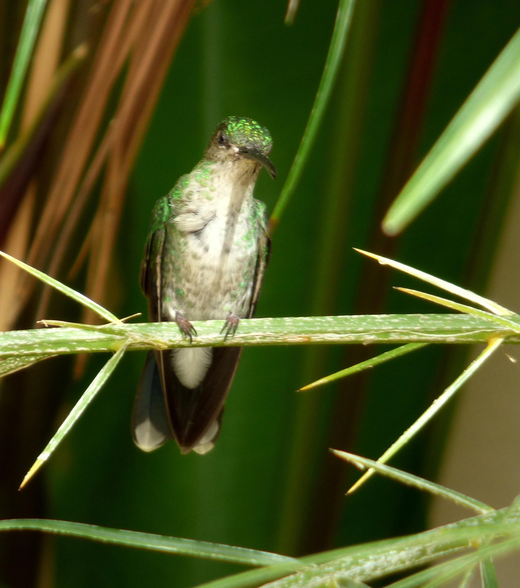 Chalybura buffonii (Colibrí de Buffon) - Hembra